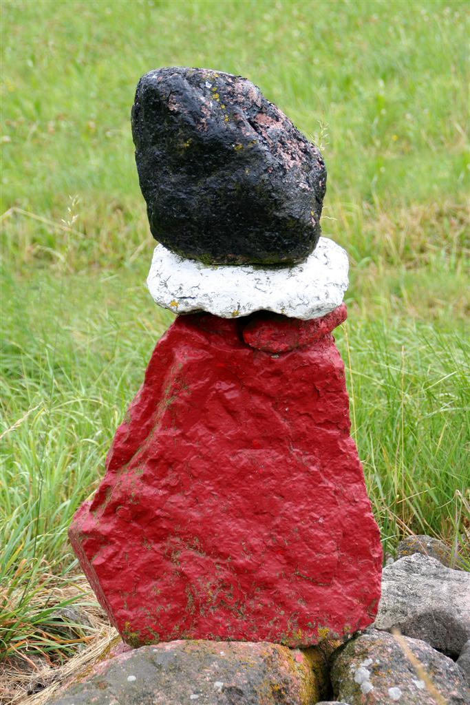 Fallosliknande stenarrangemang, "Rödsten" i Grebo socken, Åtvidaberg. Foto: Tor Svensson